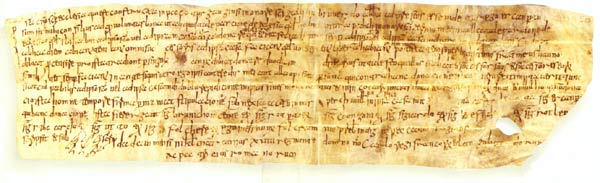 St. Galler Urkunde vom 27. Februar 786. Das Original befindet sich im Kloster-Archiv St. Gallen (Urkundenbuch I 90). Der Ortsname prampahch befindet sich in der zweiten Zeile (Mitte).